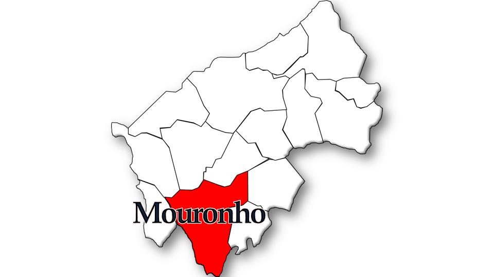 População